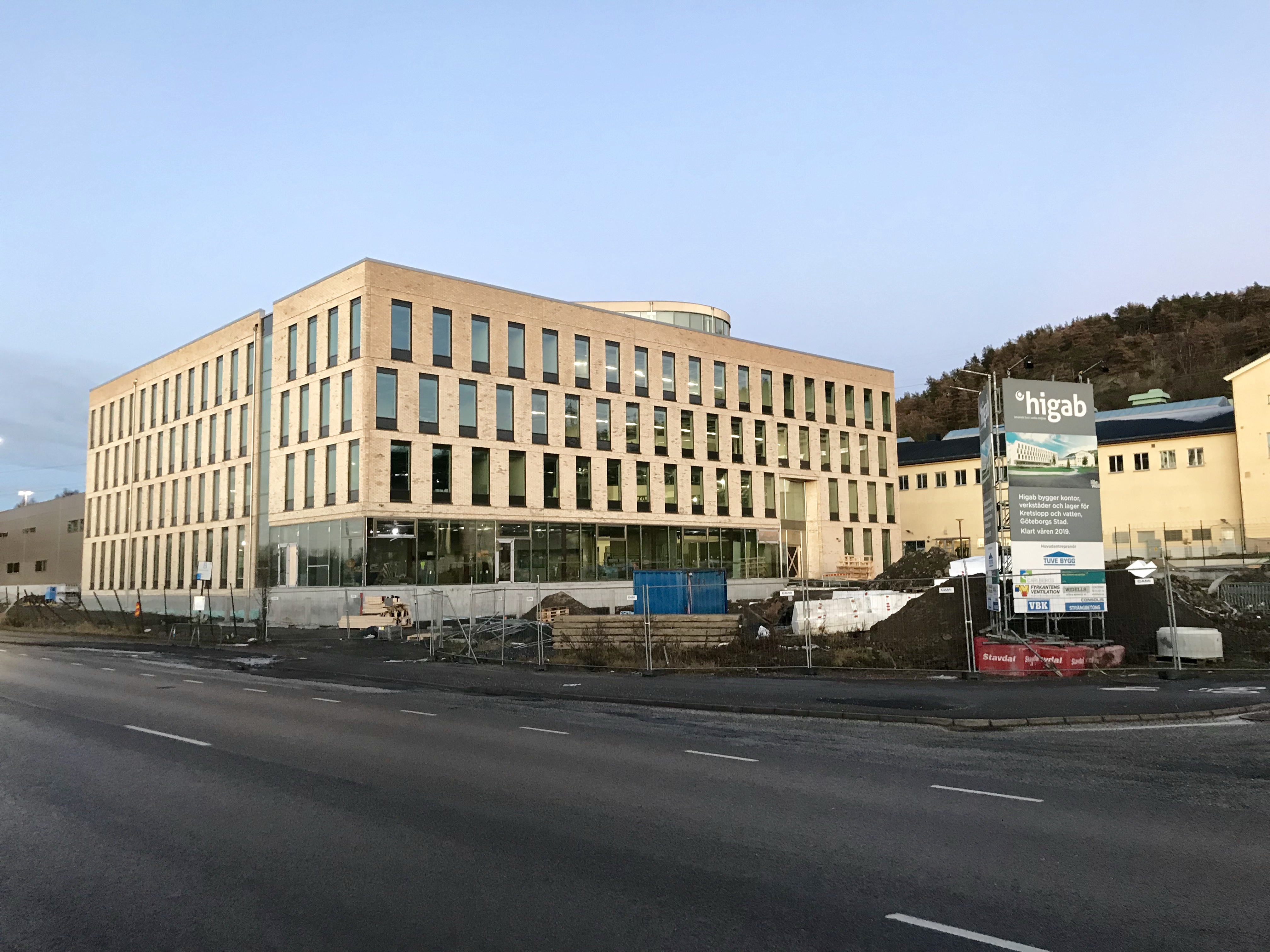 Nybyggt kontor för Göteborgs stad, kretslopp och vatten, även känt som Alelyckans vattenverk, vid Gamlestadsvägen. Arkitekter: Liljewall arkitekter AB. Byggherre: Higab